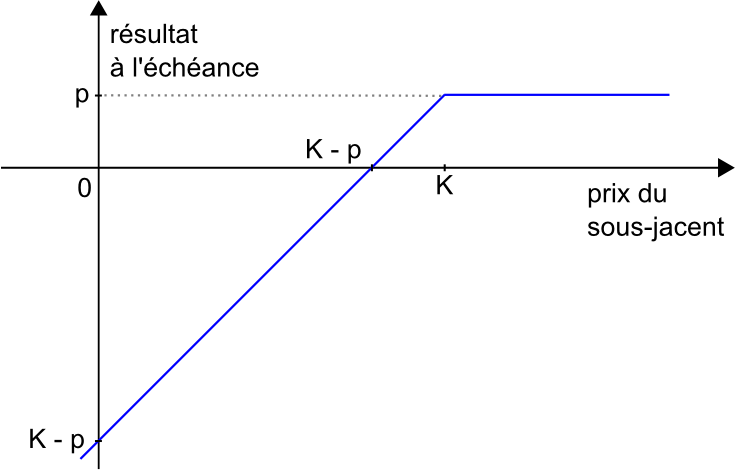 Profil de résultat d'un vendeur d'un put - Pay off of a short put